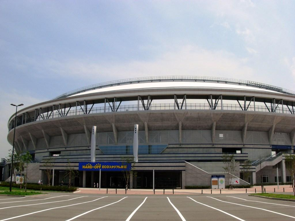 新潟県立野球場（HARD OFF ECOスタジアム新潟）・メインスタンド正面